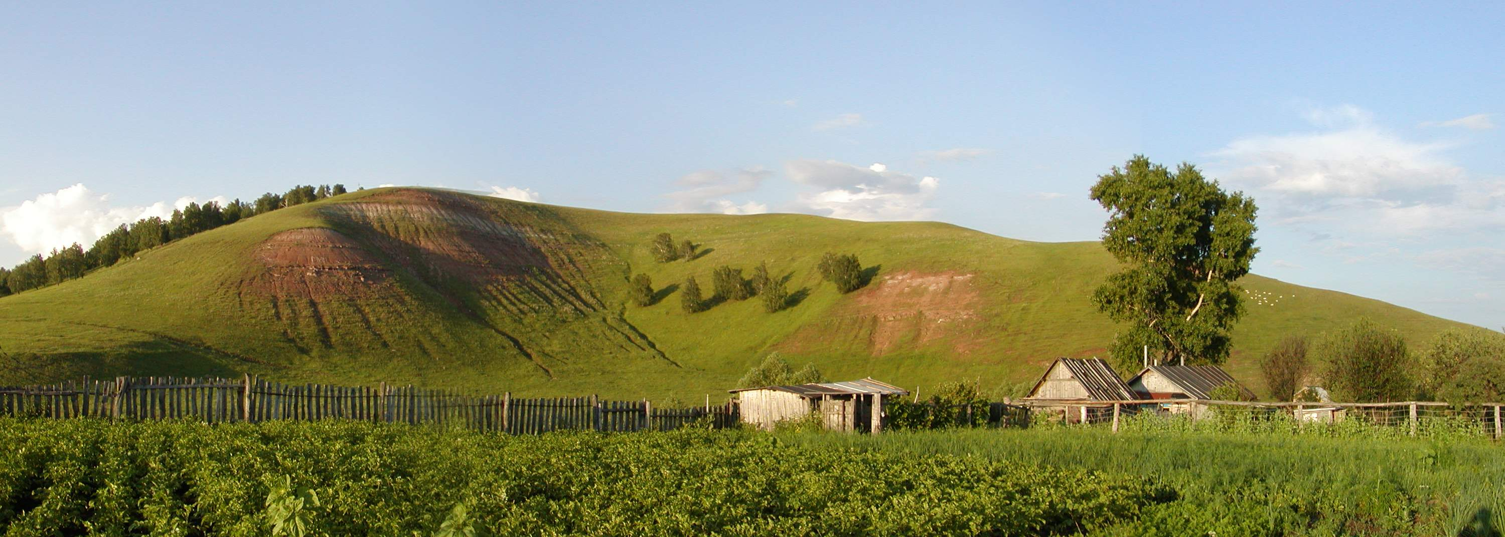 Зай-Каратай, гора "Мир" (панорама)